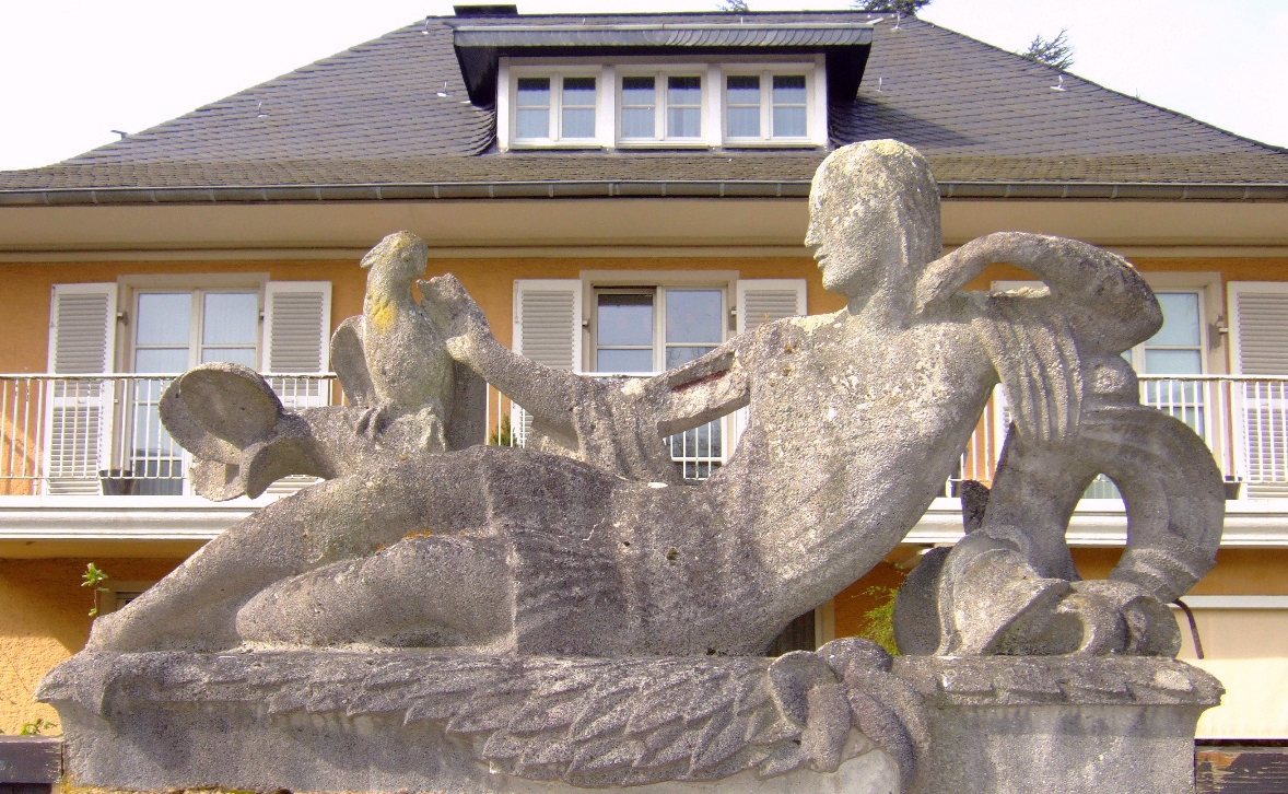 Willy Meller: weibliche Liegefigur 1925/1926 / Köln - Eugen-Lange-Straße 11-13